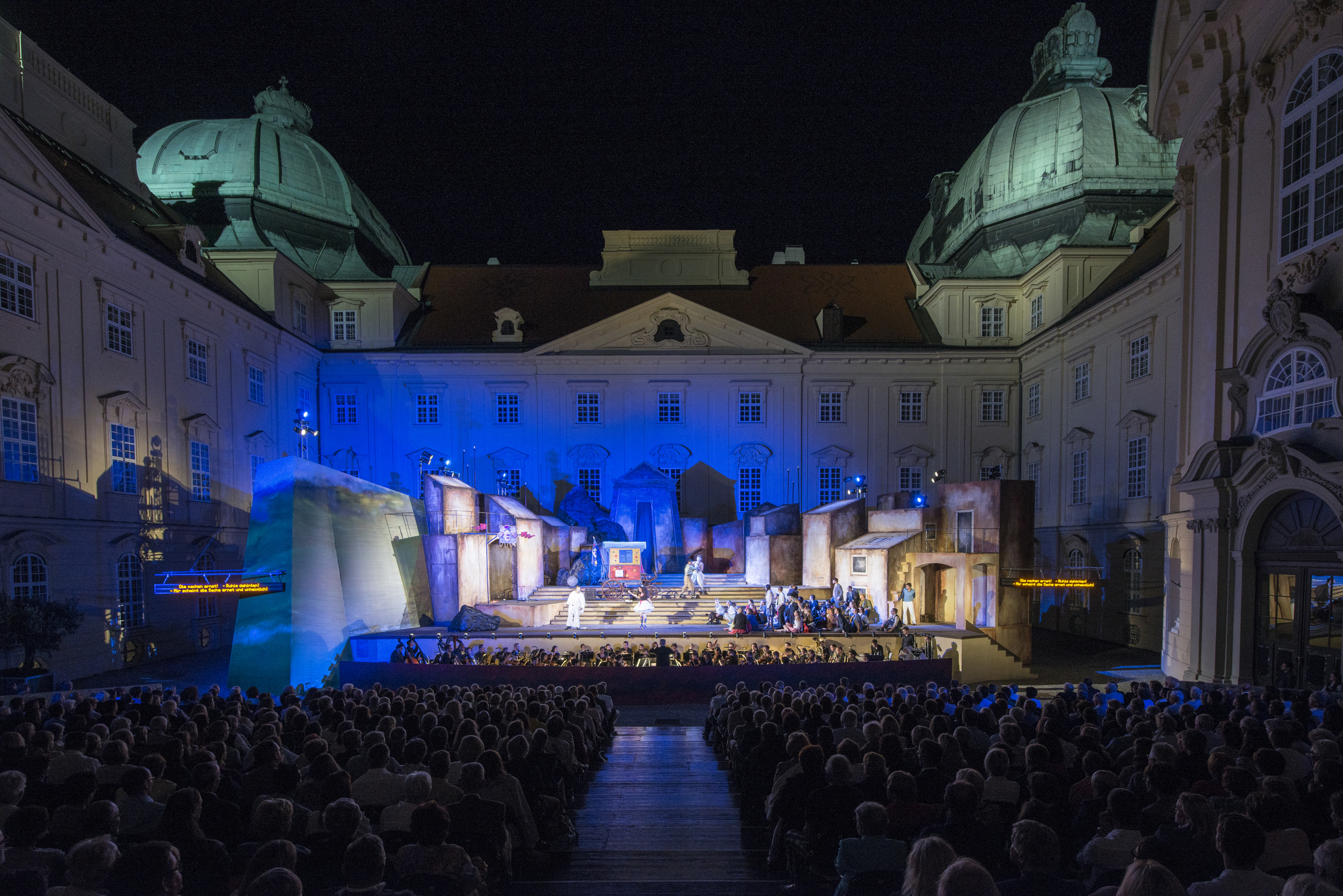 Kaiserhof